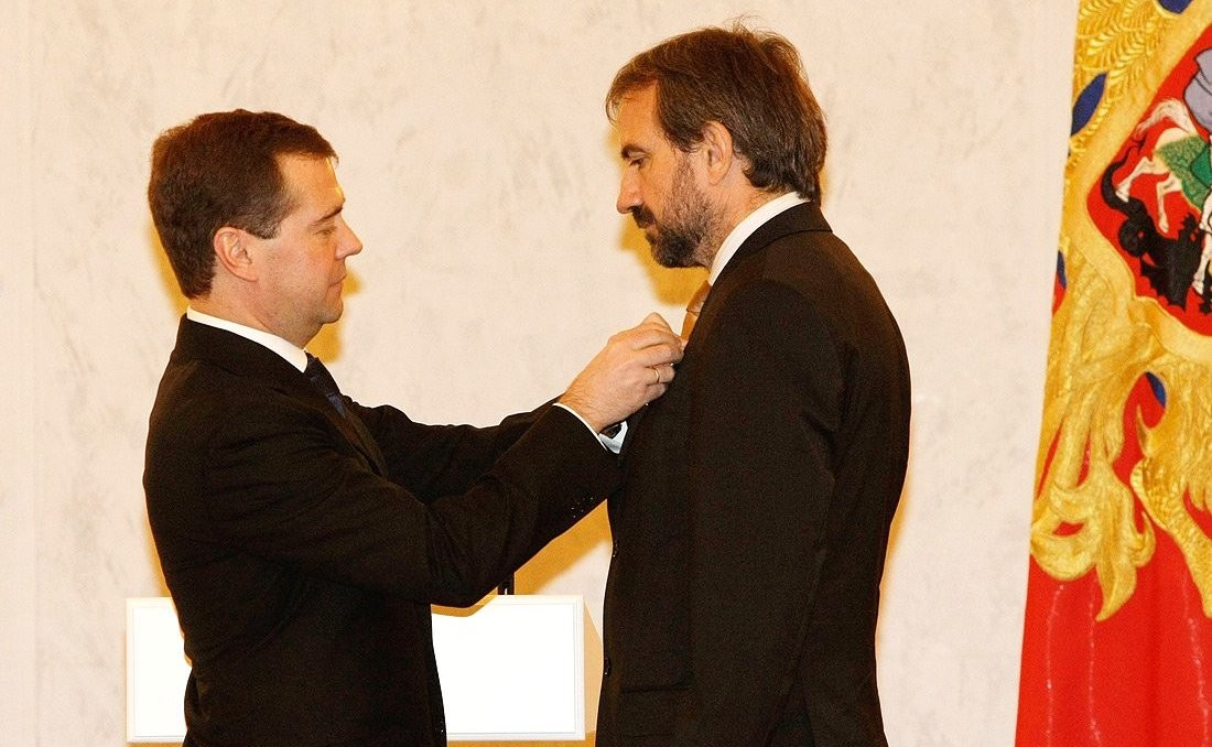 Дмитрий Медведев награждает Орденом Почёта Германа Парцингера